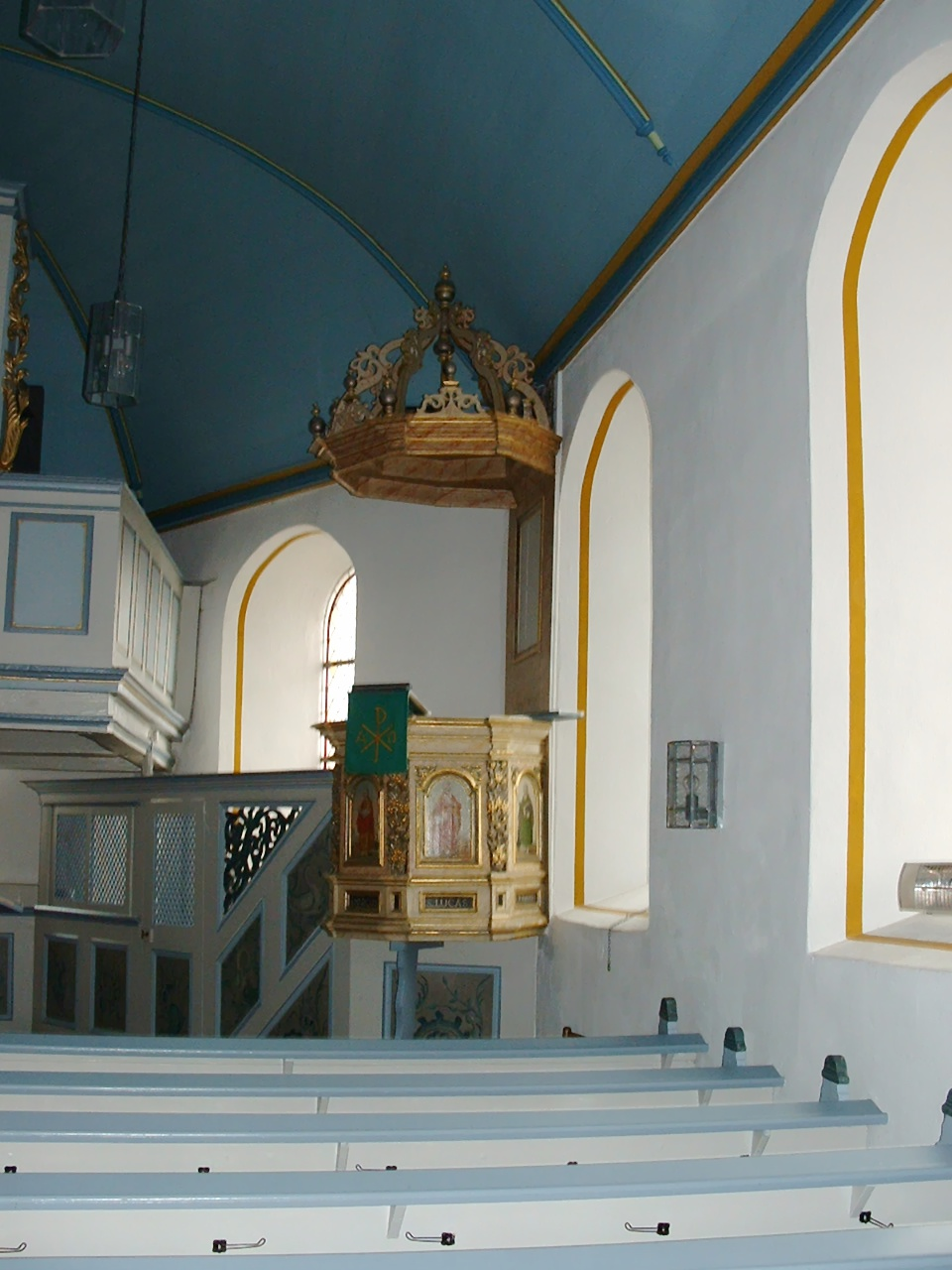 Evangelische Kirche Bruchweiler, Kirchenschiff, Kanzel